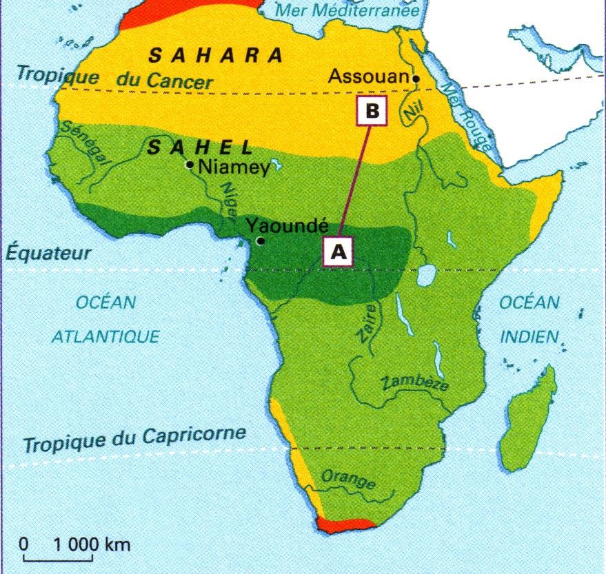 Carte géographique du Sahara.